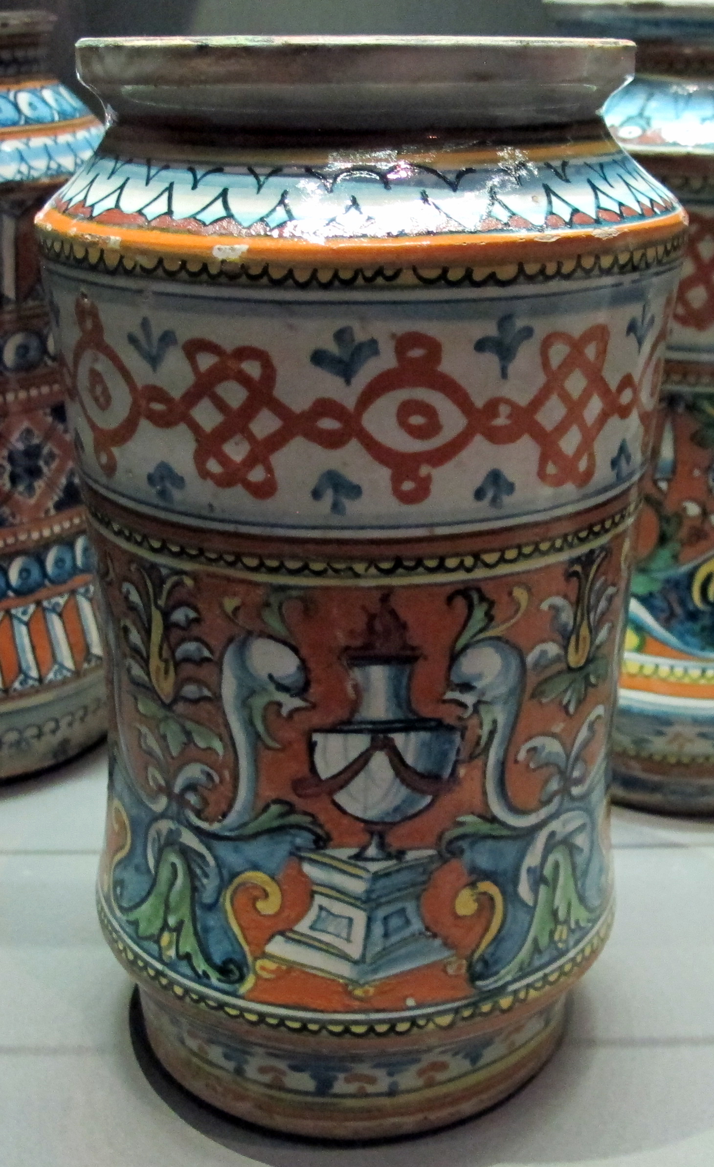 Maiolica del Louvre